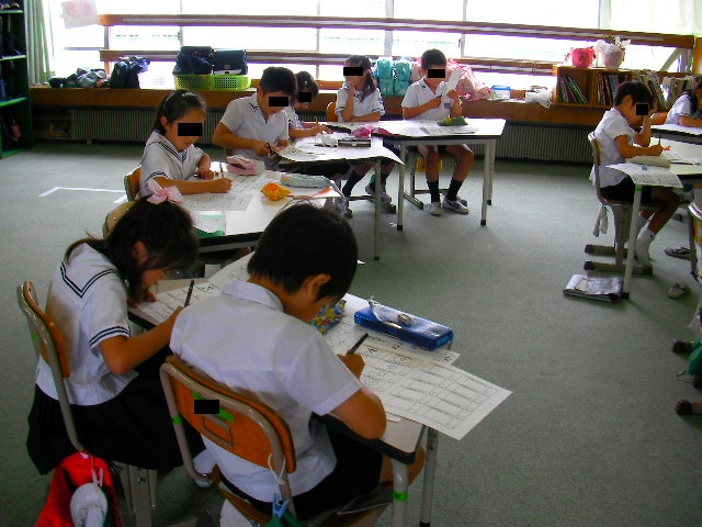 暁秀初等学校レギュラークラス教室における机配置のアレンジの例（２）